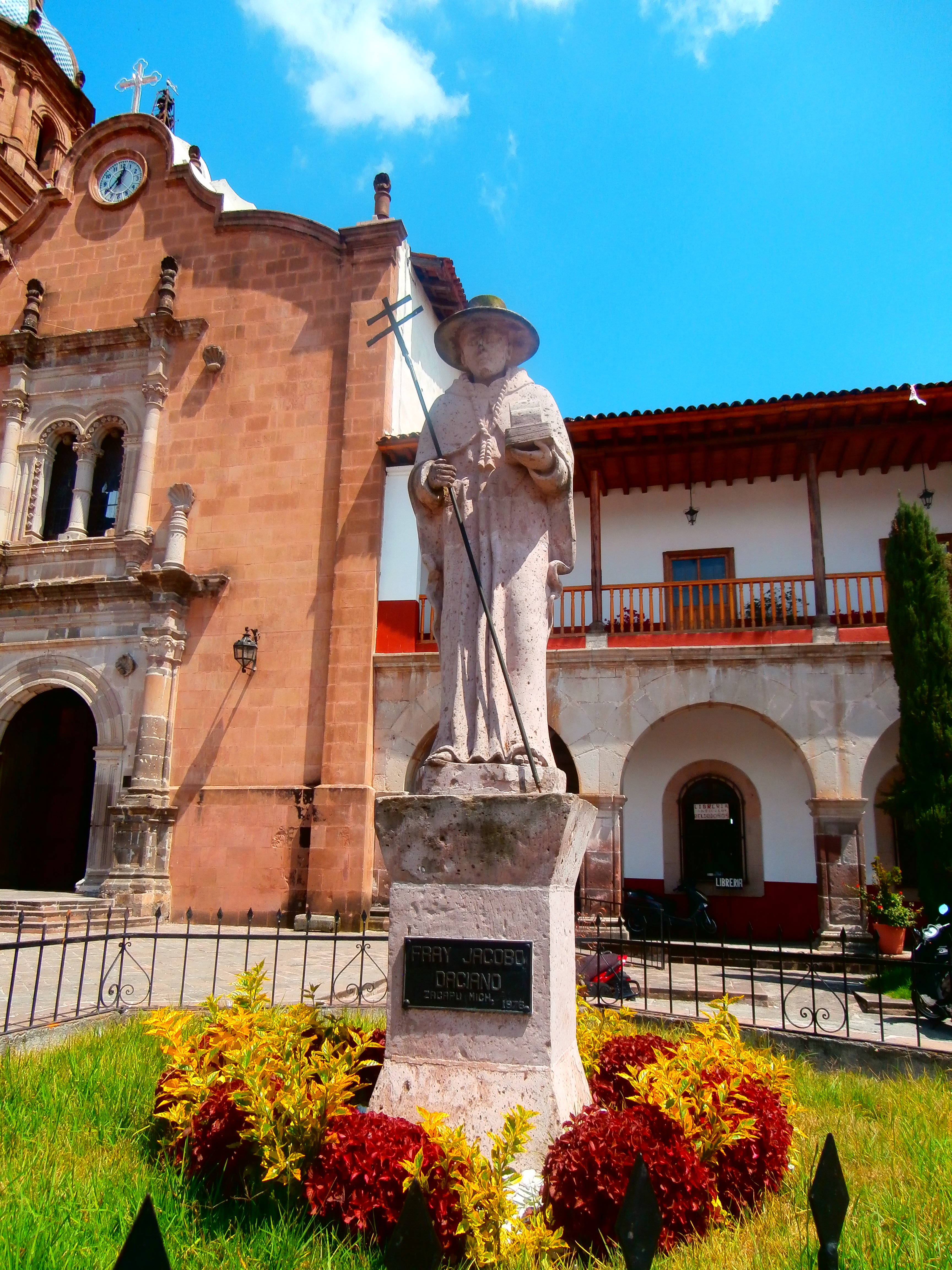 Fray Jacobo Daciano, Templo y Antiguo Convento de Santa Ana Zacapu